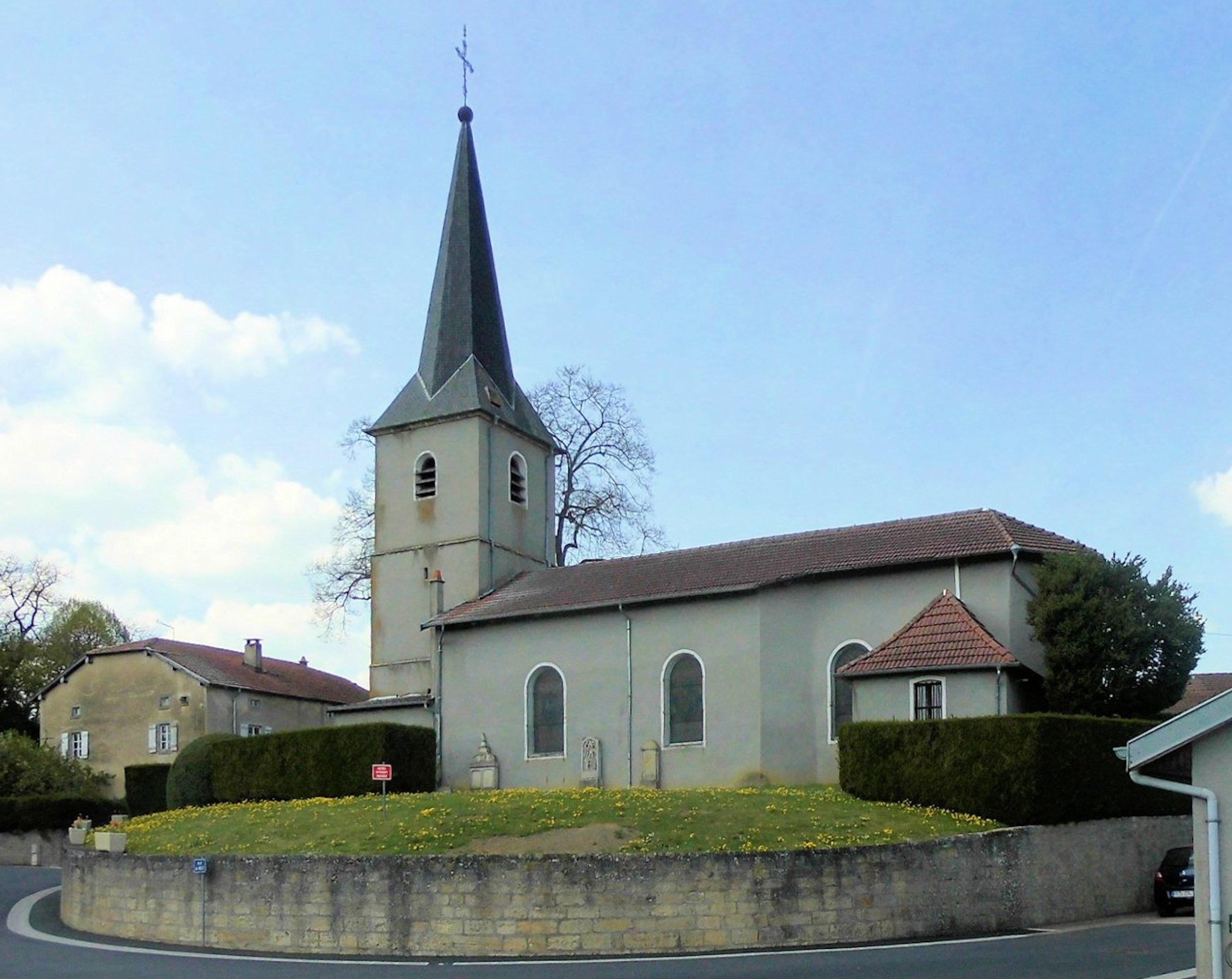 L'église Saint-Martin de Morelmaison